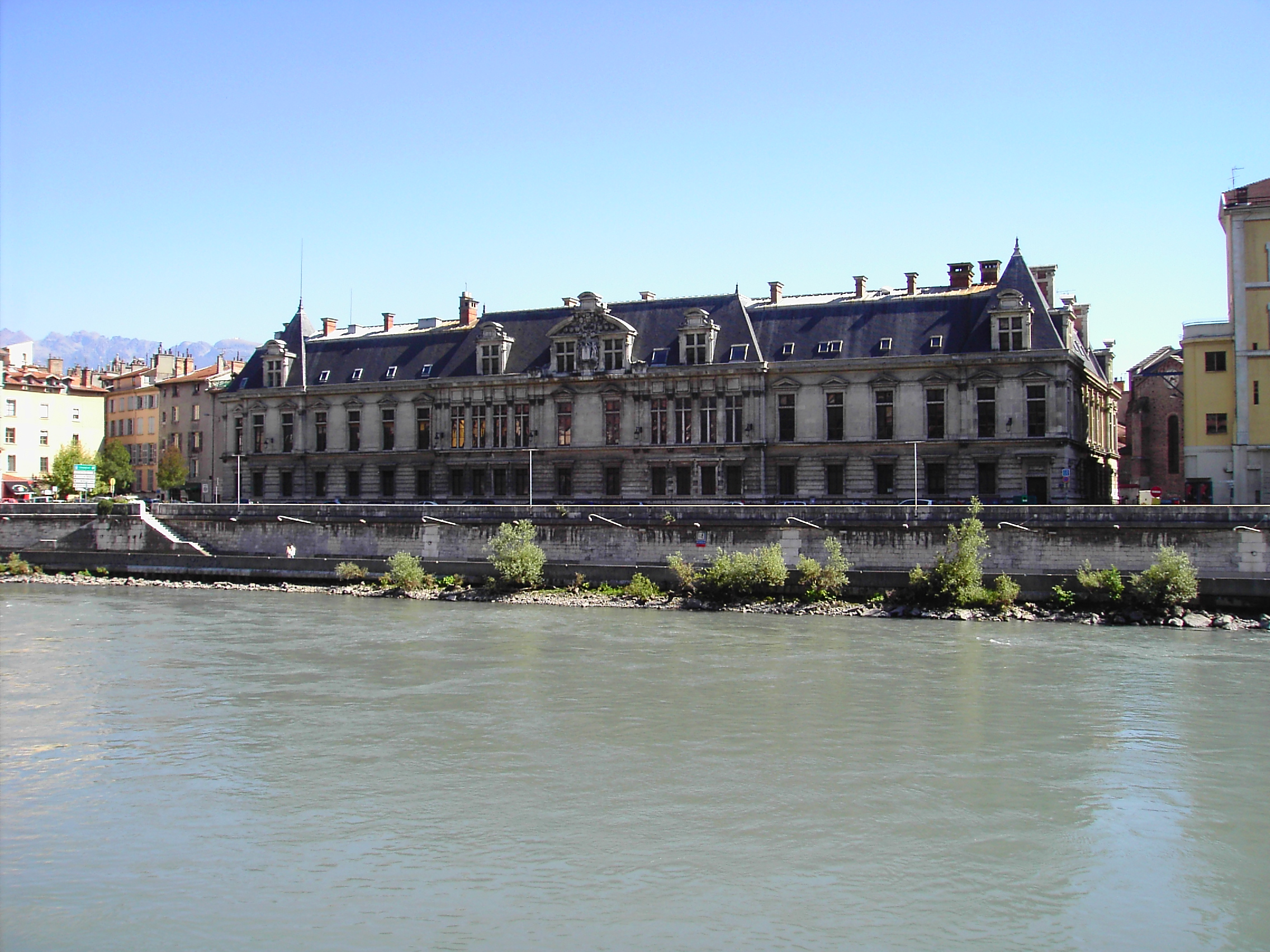 Palais delphinal sur les bords de l'Isère - Grenoble